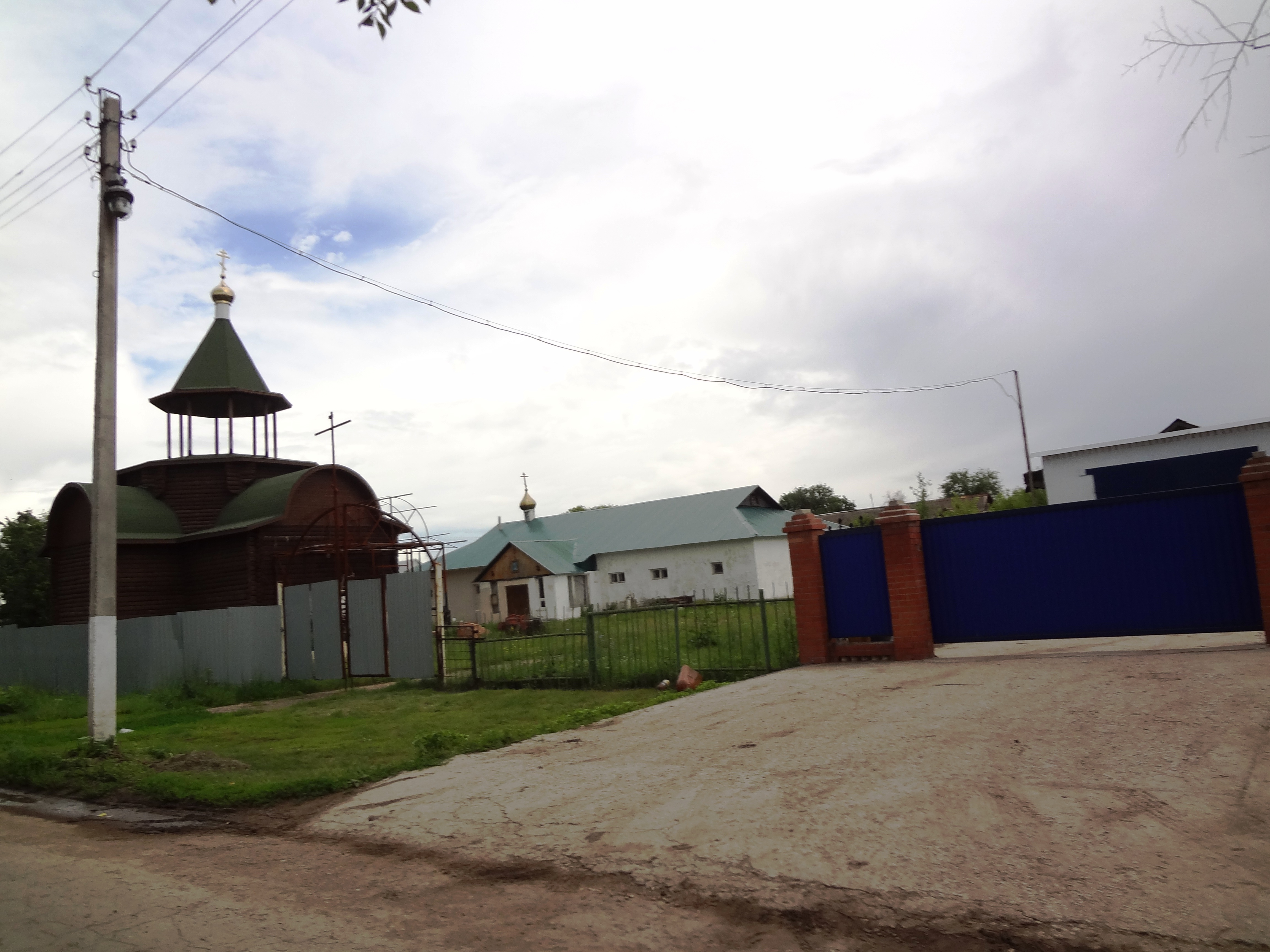 Церковь Серафима Саровского. Поселок Осинки Самарская область